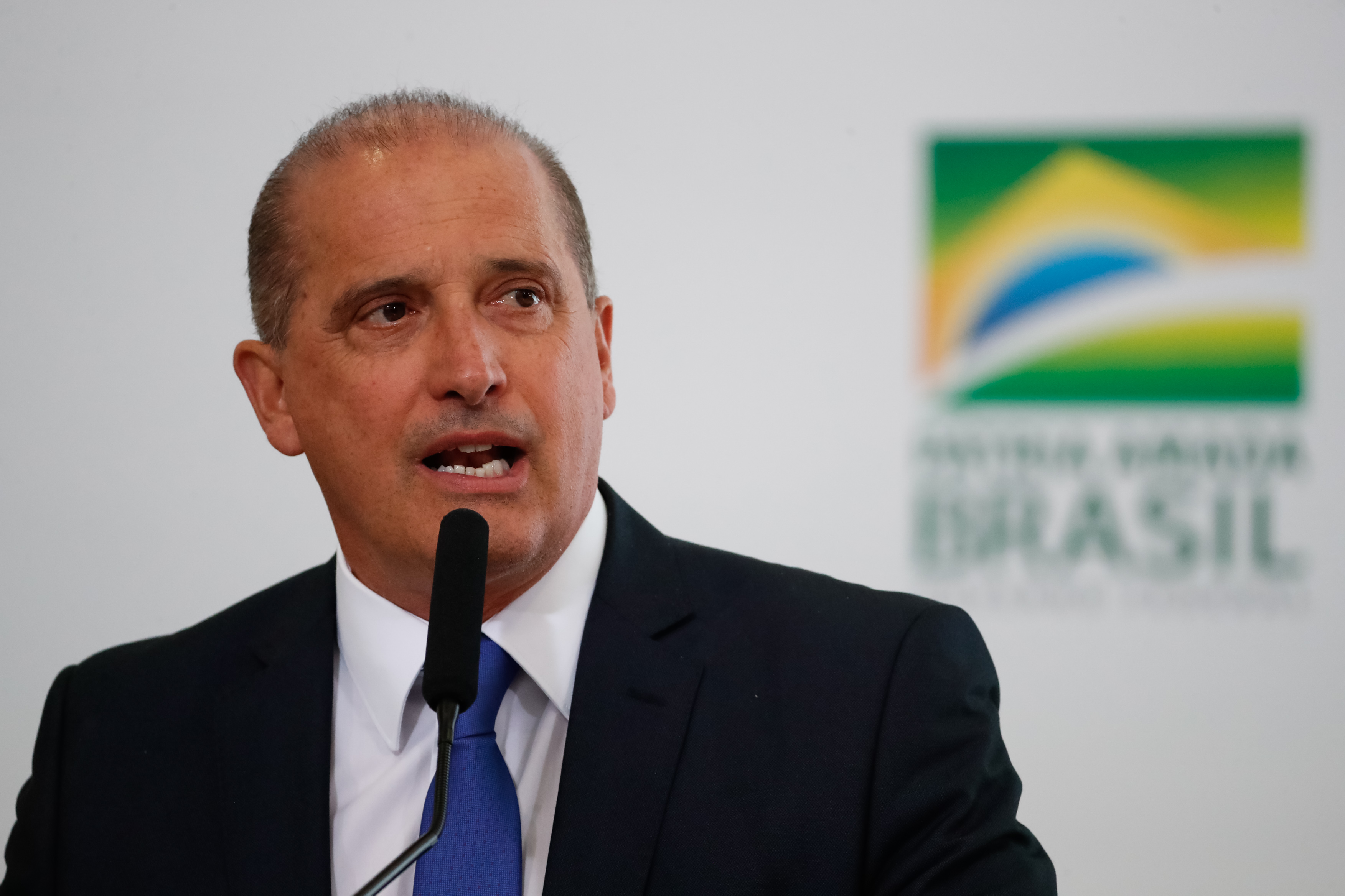 (Brasília - DF, 18/07/2019) Palavras do Ministro da Casa Civil da Presidência da República, Onyx Lorenzoni. Foto: Alan Santos/PR